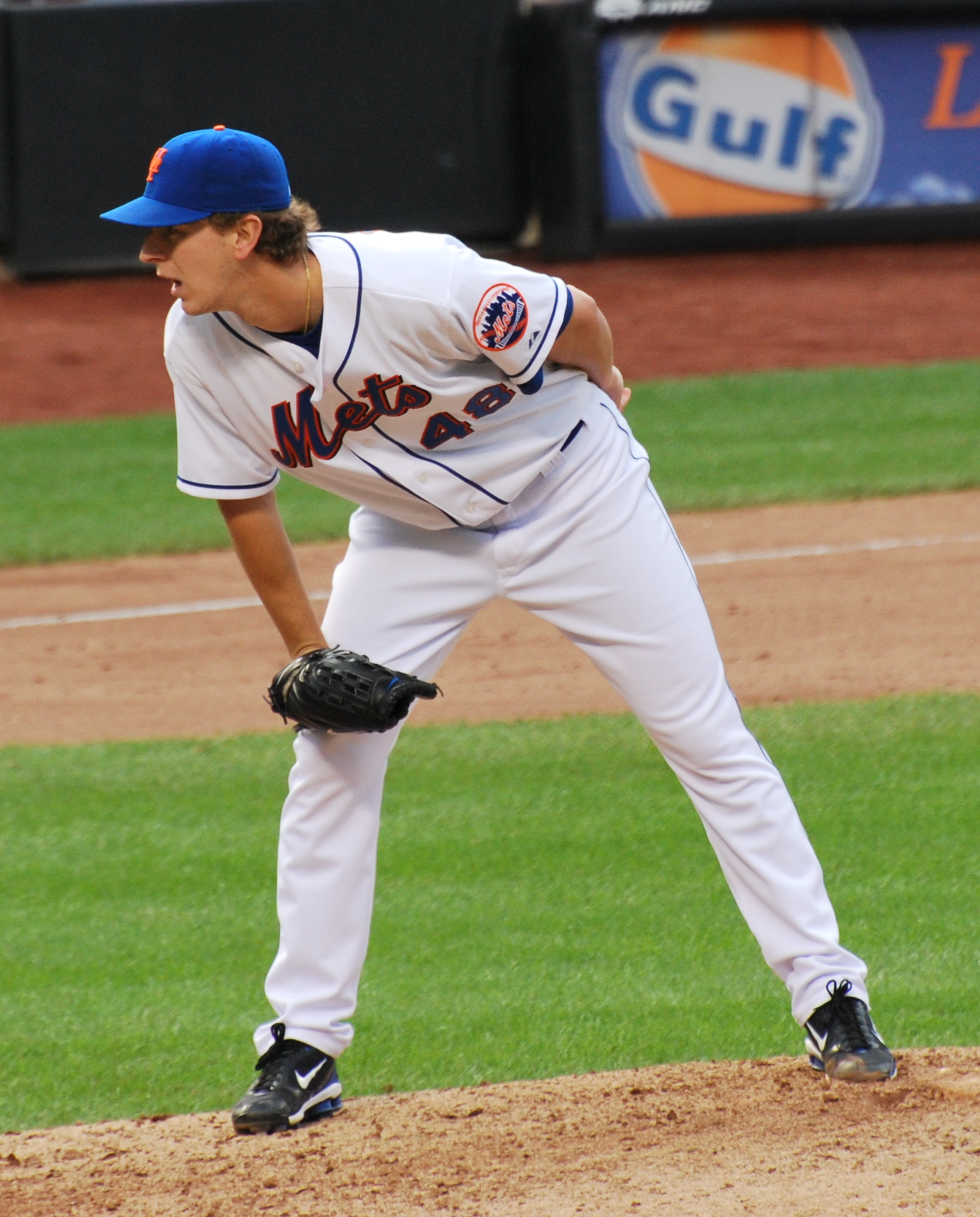 Pat Misch